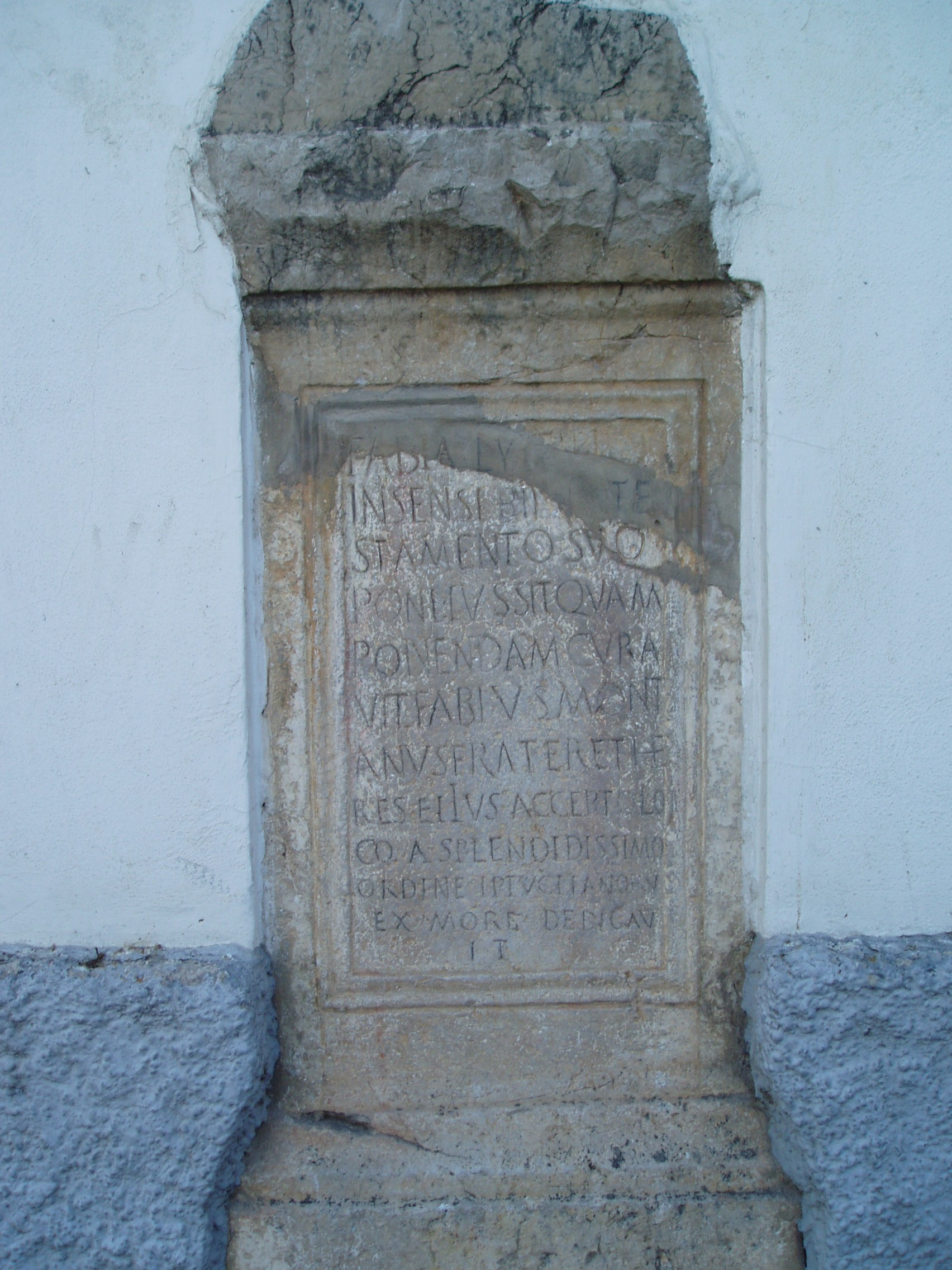 Cipo funerario de la ciudad hispanorromana de Iptuci incrustado en la iglesia de Prado del Rey, provincia de Cádiz. En este monumento funerario se lee: "Fabia Fabiana, hija de Cayo, dispuso en su testamento que en lugar público se le erigiese una estatua. Así lo ha cumplido su hermano Fabio Montano y ha dedicado la estatua en el lugar que le fue otorgado por el esplendísimo ayuntamiento de Iptuci". Corresponde con la inscripción CIL II 1923, y su texto latino dice: FABIA [---] FABIA[NA]/ INSENSI SIC[--- TE]/STAMENTO SVO/ PONI IVSSIT QVAM/ PONENDAM CURA/VIT FABIVS MONT/ANVS FRATER ET HE/RES EI{I}VS ACCEPTO LO/CO A SPELNDISSIMO/ ORDINE IPTVCITANORVM/ ET EX MORE DEDICAV/IT.